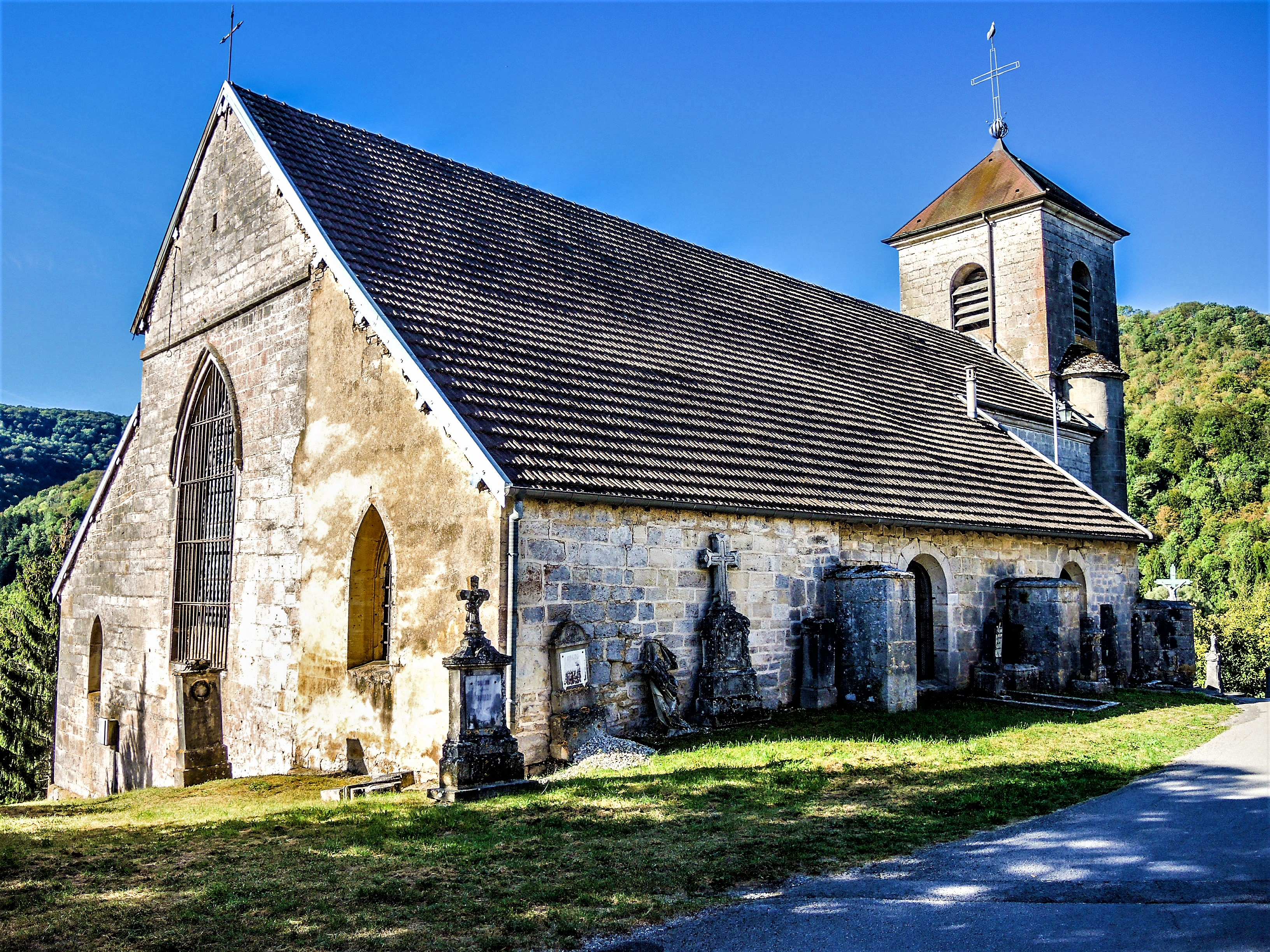 Eglise de Montgesoye